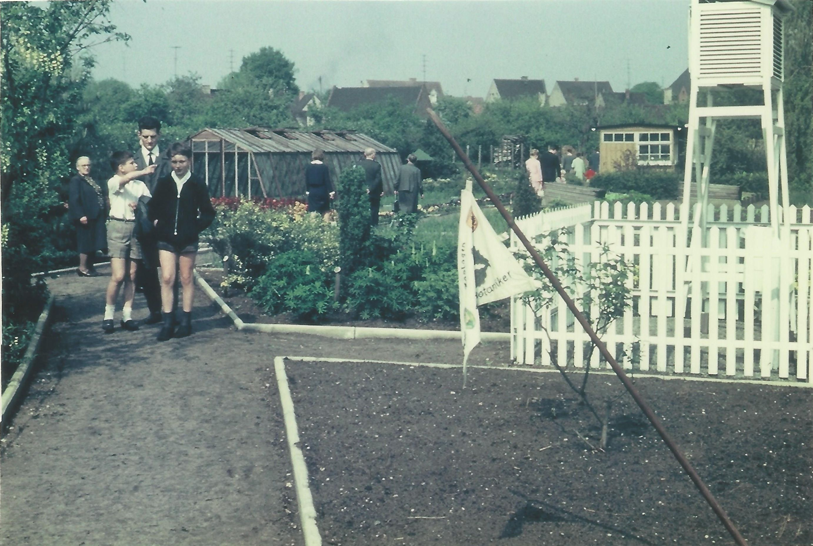 Ruhland, Hartwigstraße, Schulgarten bei einer Besichtigung, rechts Wetterstation, daneben Horst Bormann mit zwei Jungen Meteorologen